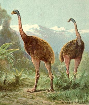 Artist impression of a pair of Moa.